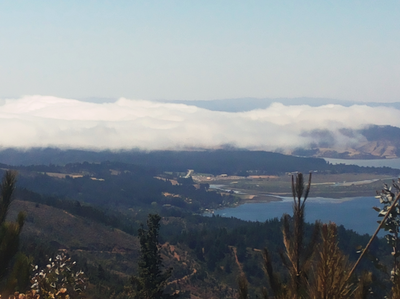 Ola de nubes arrasando los bosques del lago vichuquen